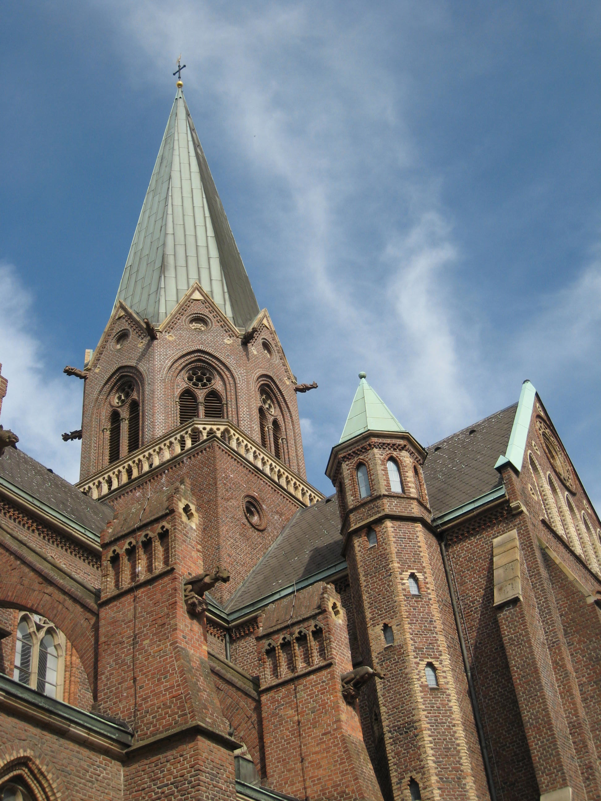 Stiftskirche St. Clara Dortmund Hörde